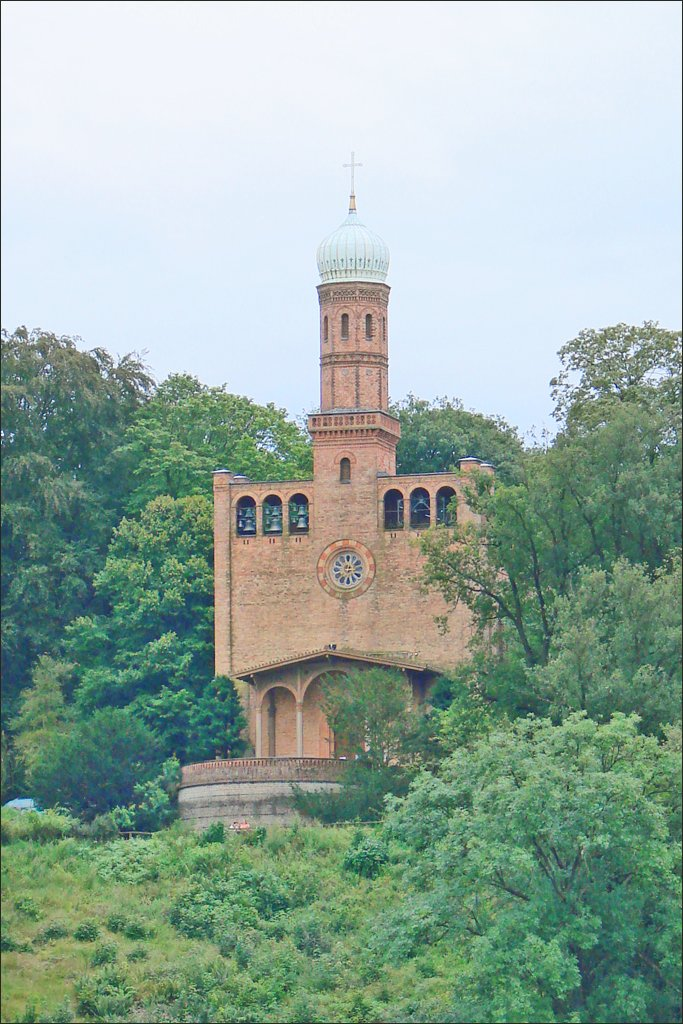 L’église évangélique St. Peter und Paul, fut conçue par les élèves de Schinkel, Stüler et Schadow, entre 1834 et 1837. Comme la maison forestière avoisinante Nikolskoe, elle fut offerte par l’empereur Frédéric Guillaume III à sa fille Charlotte et à son gendre Nicolas, le futur tsar. Les tours à l’impériale et l’avant-corps en bois sont d’inspiration russe. L’intérieur de style classique et entièrement conservé, est unique à Berlin.